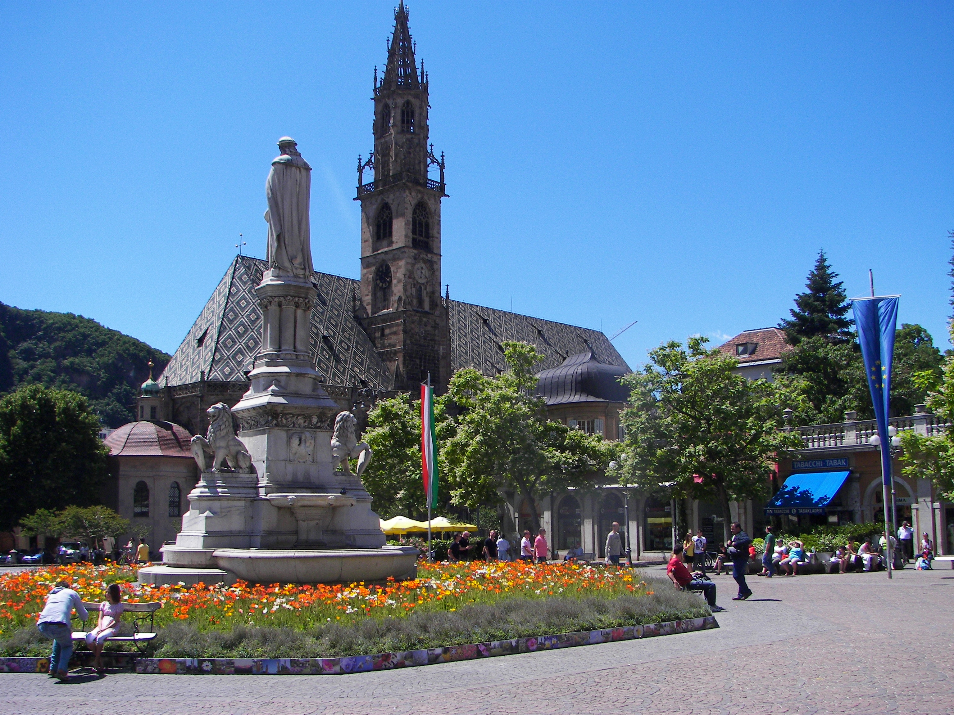 Bozen, Waltherplatz mit gotischem Dom Mariä Himmelfahrt